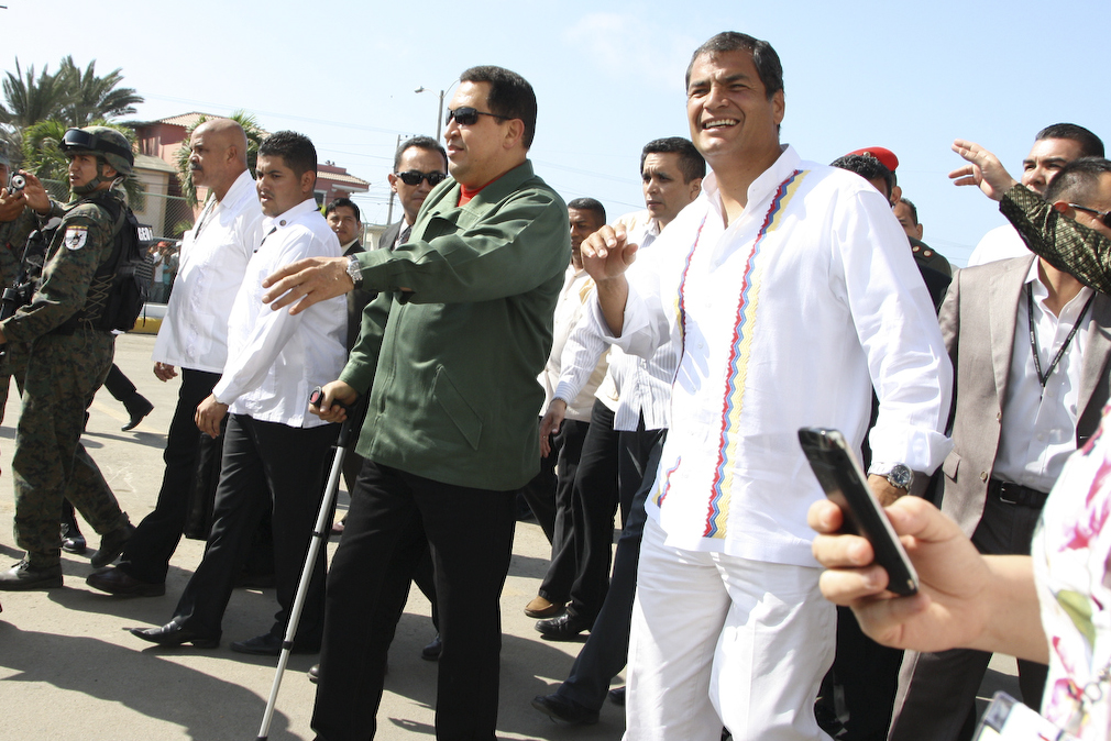 Salinas (Guayas), 7 junio de 2011.- El primer mandatario de Ecuador, Rafael Correa y su homónimo venezolano Hugo Chávez, arriban al salón plenario del noveno encuentro presidencial entre estos dos países.